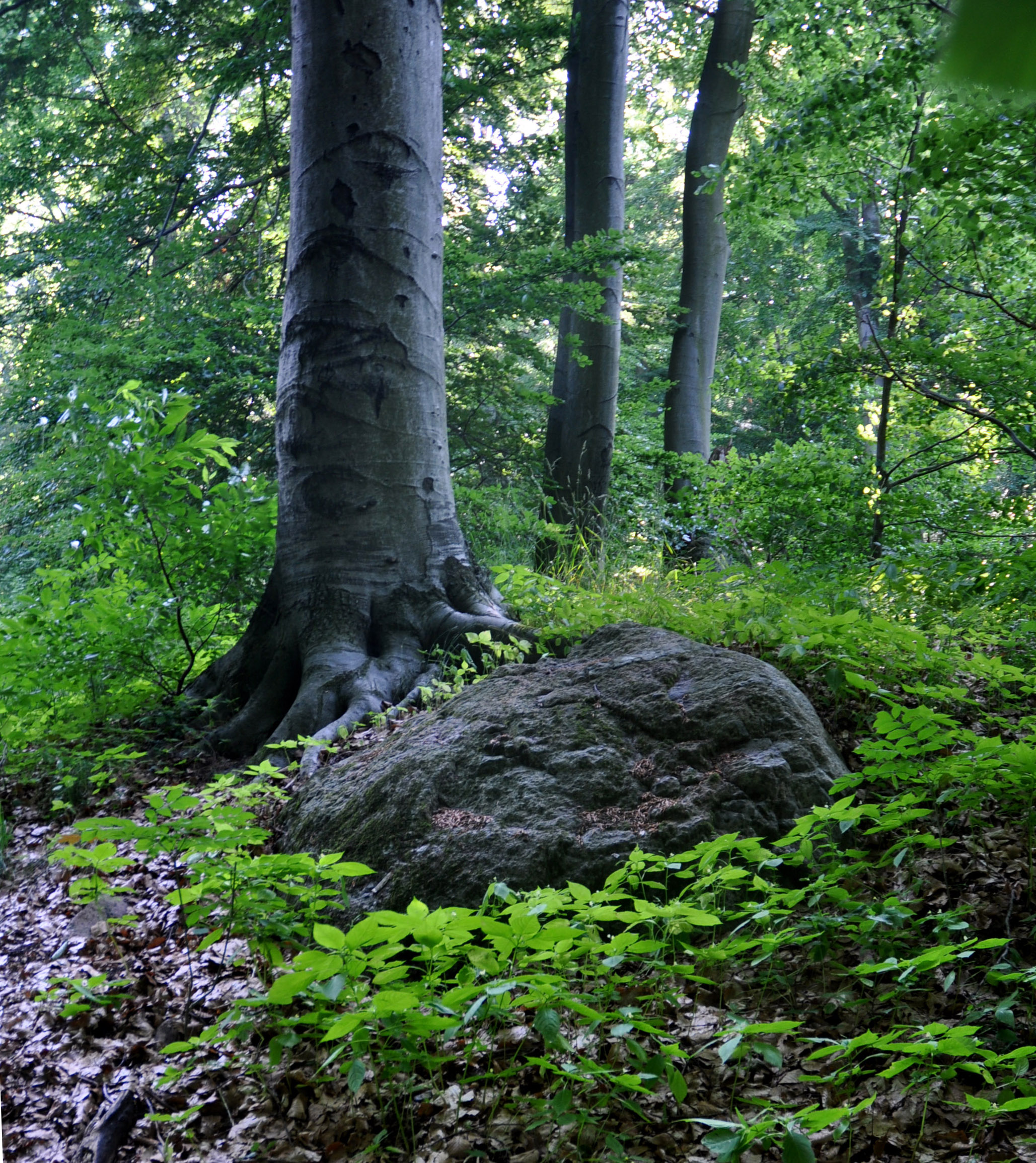 Findling in Buchenpflanzungen im Westteil des Parks